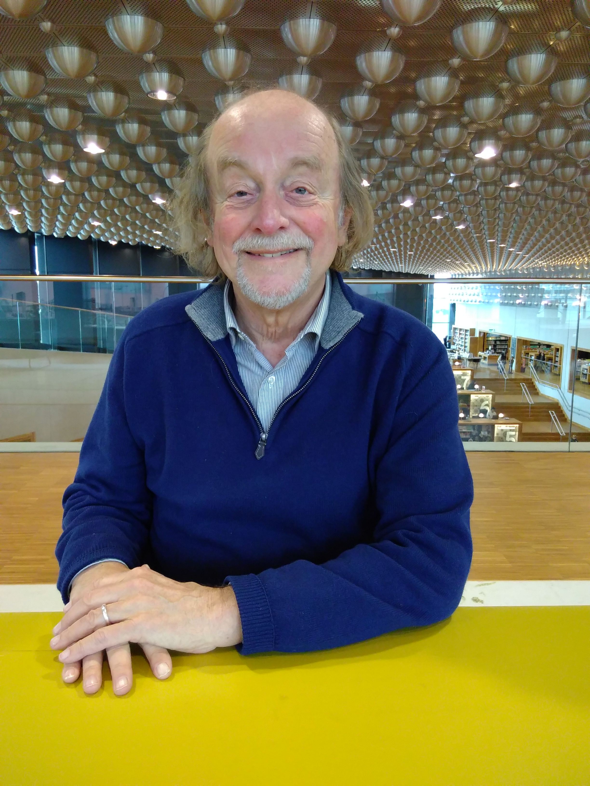 Guido de Wijs tijdens een bezoek aan Archief Eemland op 12 maart 2018.